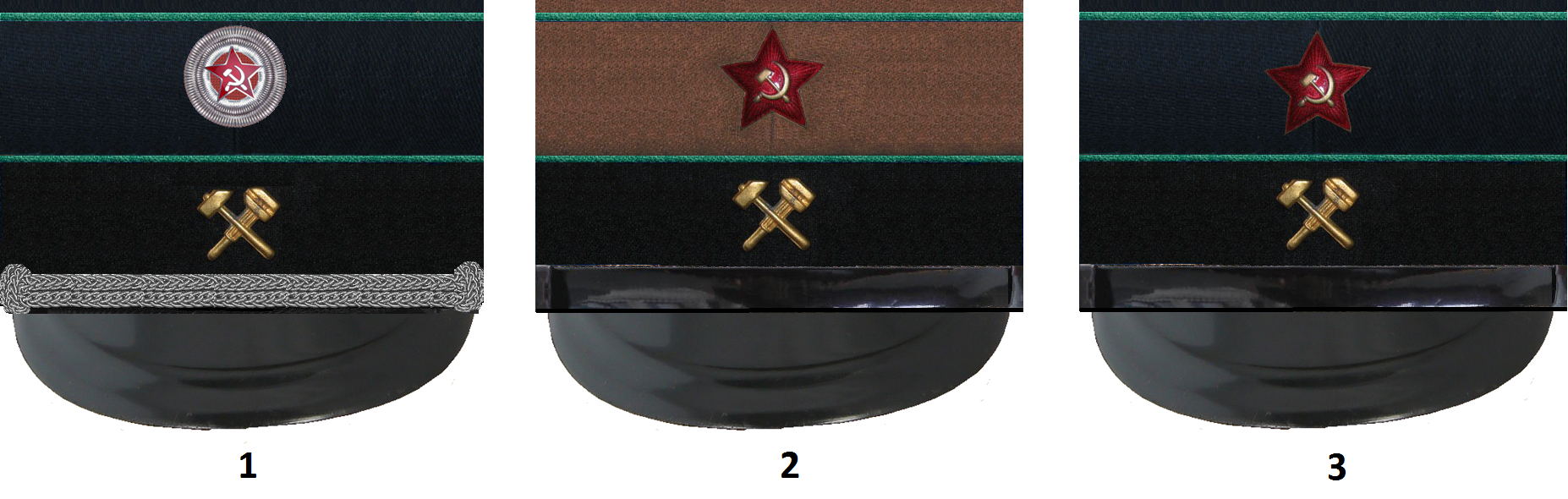 Фуражки мпс43